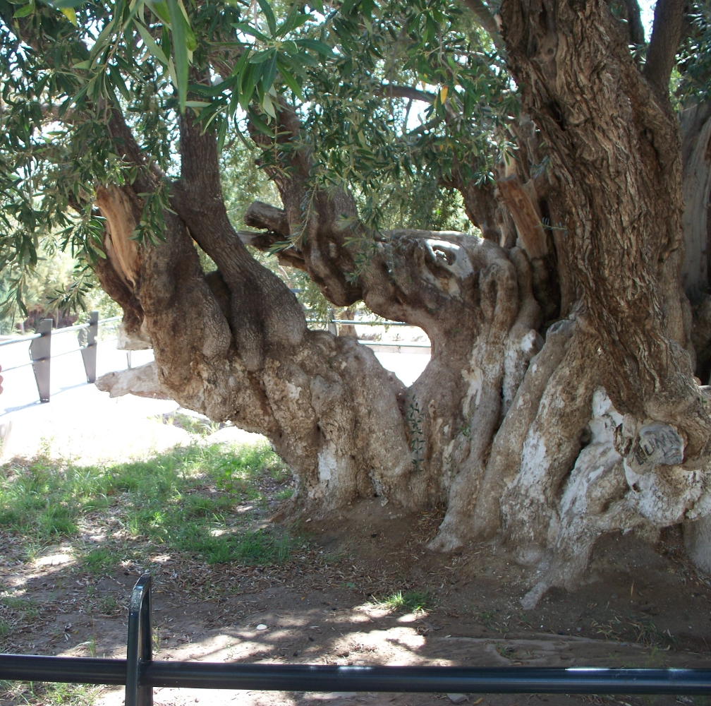 Olivo cuatricentenario de Arauco. Cuenta la historia que cuando España ordeno talar todos los olivos, este fue el unico que se salvo al ser escondido por una lugareña. Es considerado el origen de la variedad Arauco de aceitunas.